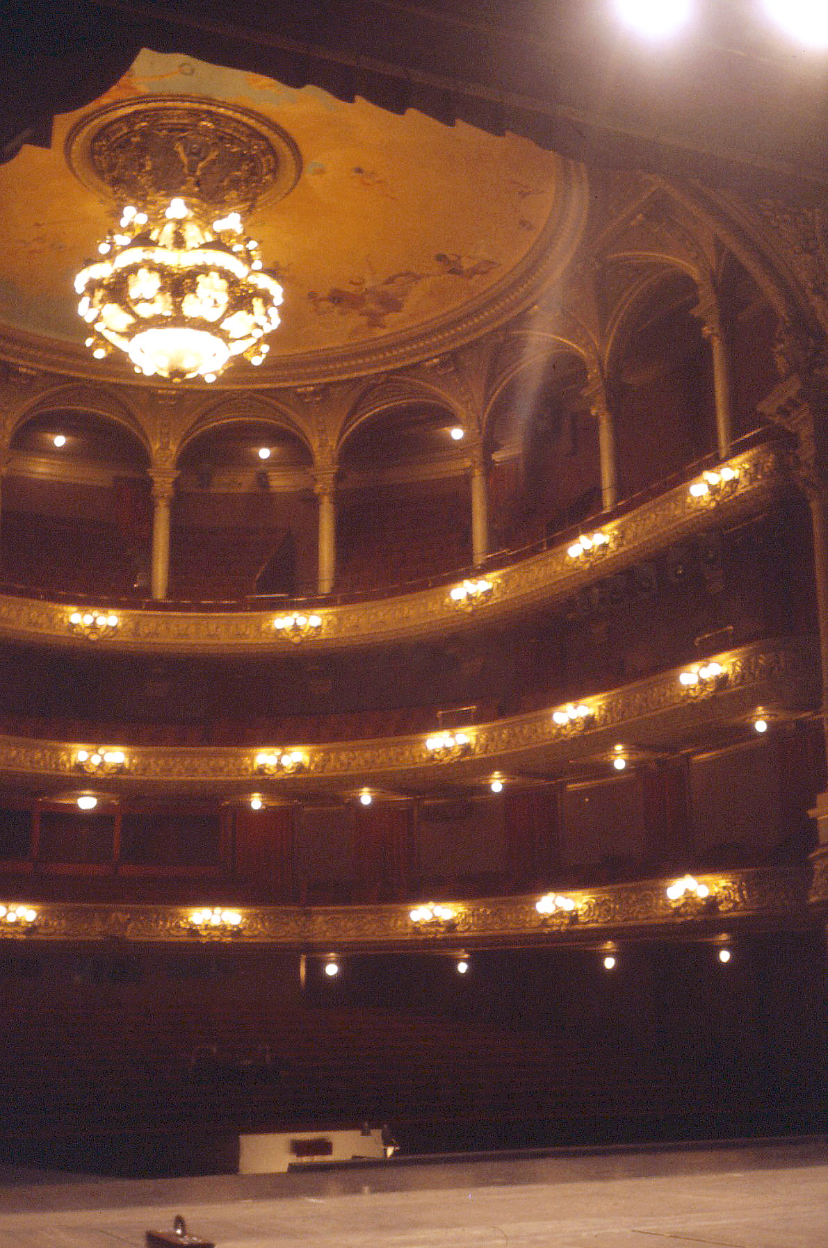 Operan i Stockholm, blick från scenen mot salongen